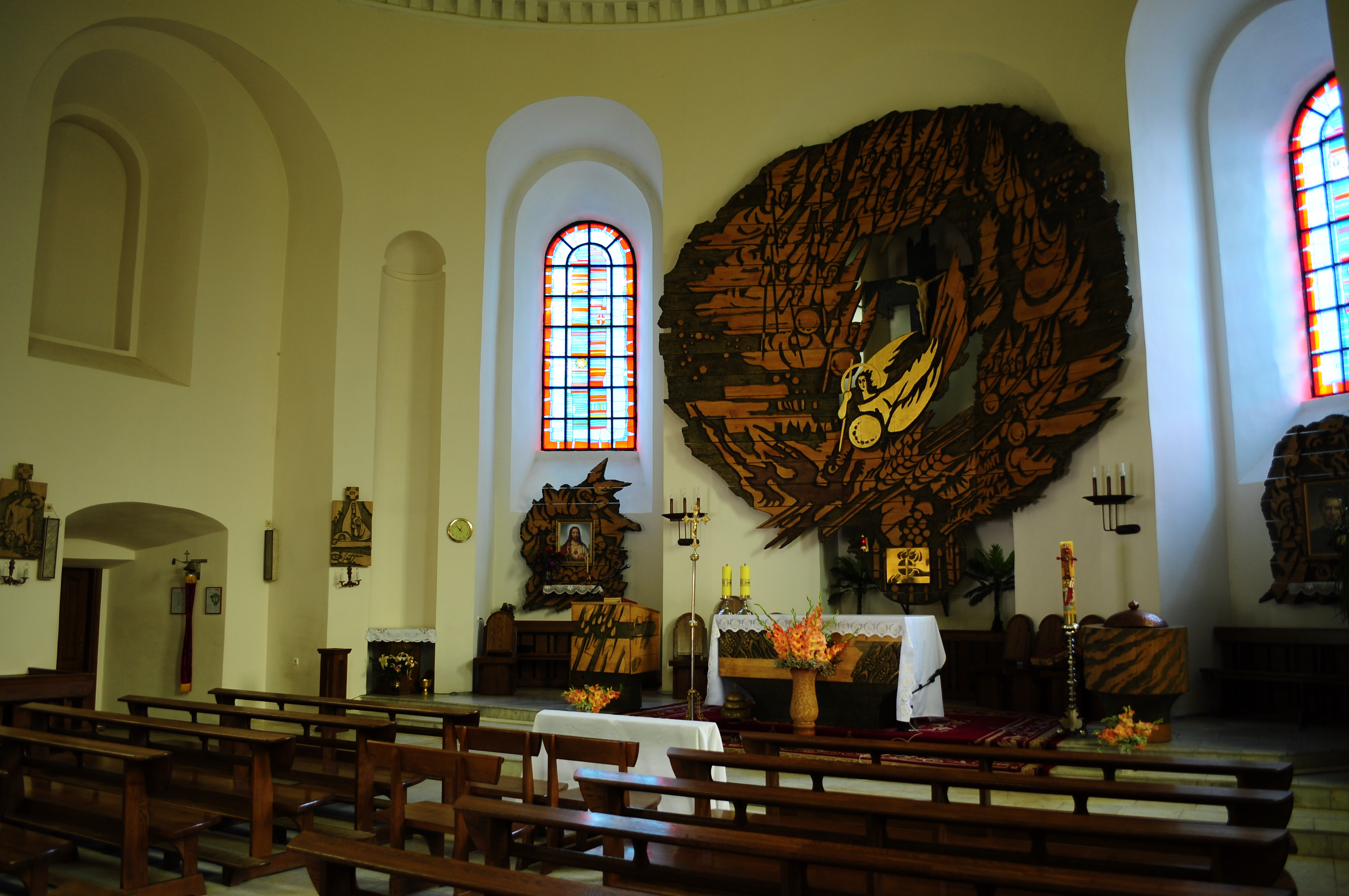 Беларуская (тарашкевіца): Смаргонь. касьцёл Сьв. Міхала Арханёла This is a photo of Belarusian heritage monument. Reference number: 412Г000585 ( WLM)